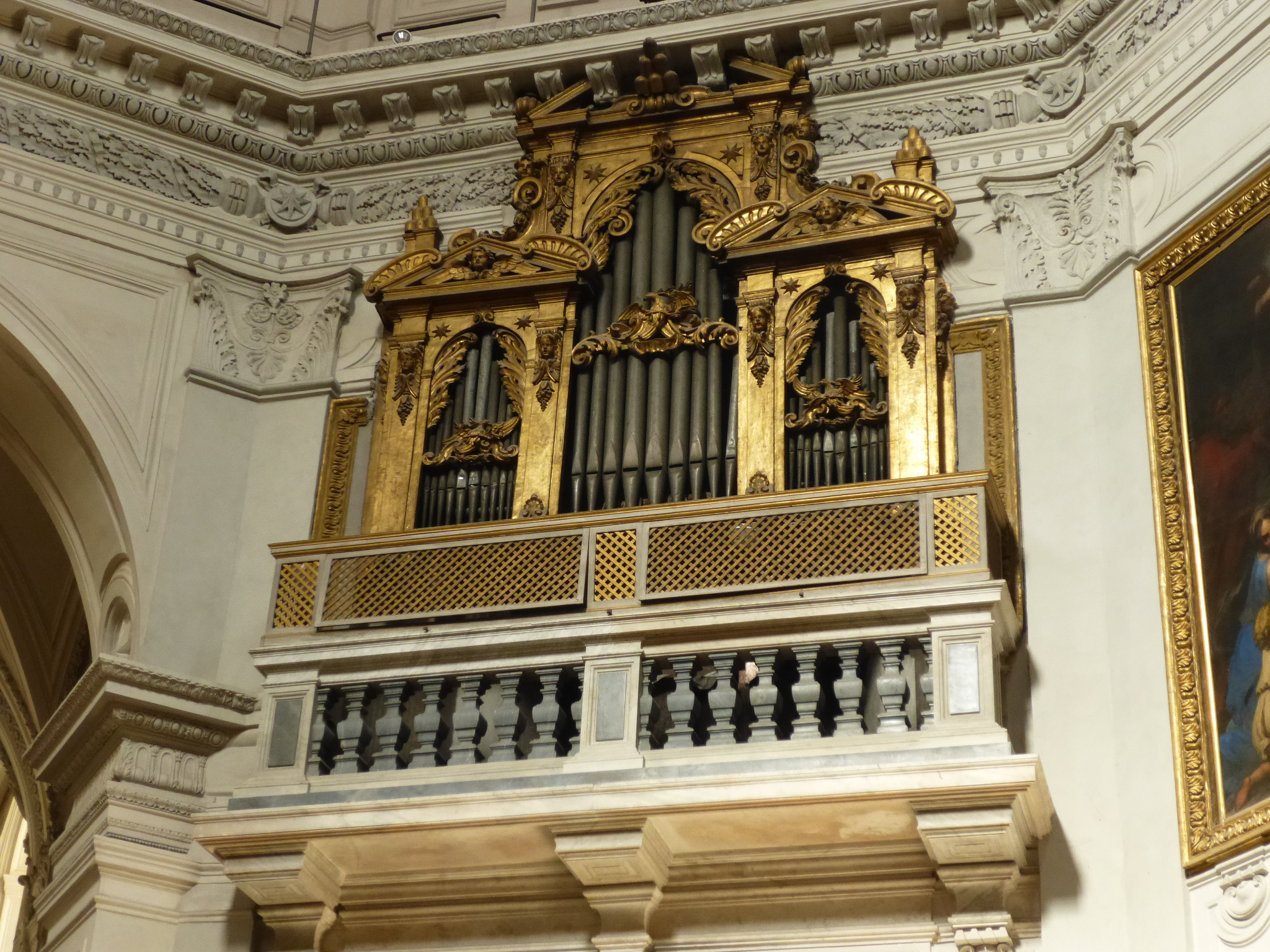 Roma, Santa Maria della Pace, organo.